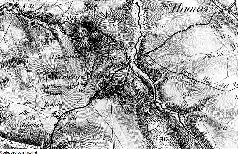 Original image description from the Deutsche Fotothek Reichenau-Hartmannsdorf-Hartmannsdorf. Oberreit, Sect. Altenberg, 1821